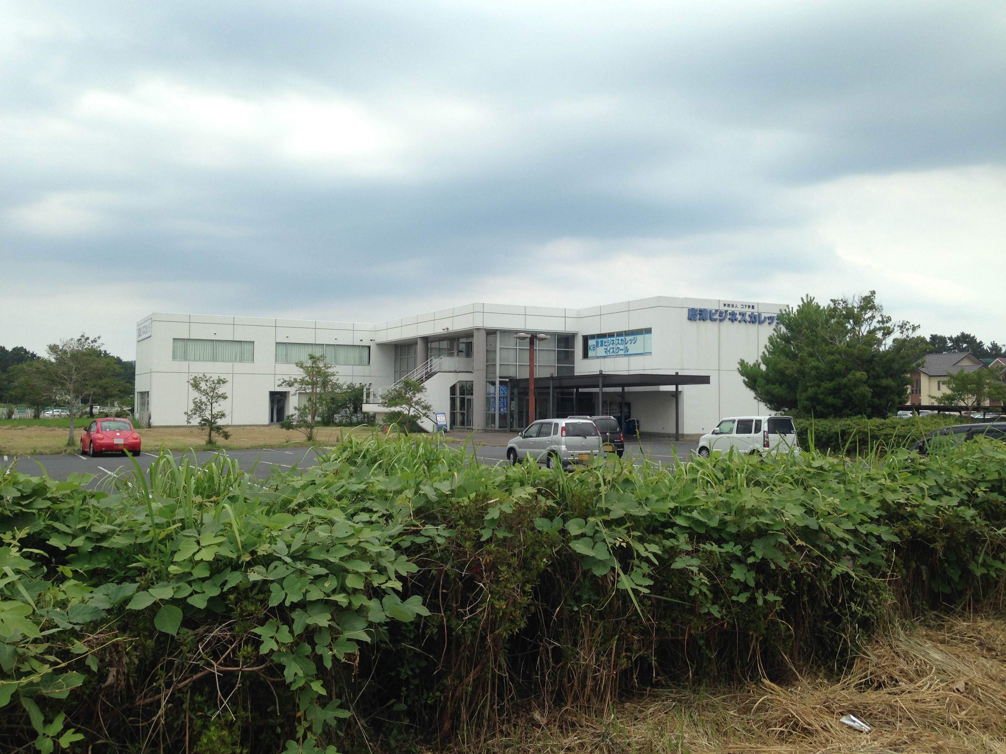 唐津ビジネスカレッジ